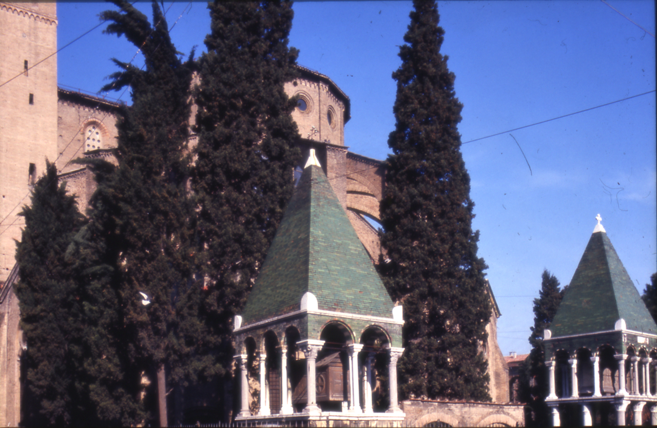 Servizio fotografico : Bologna, 1976 / Paolo Monti. - Foglio: 1, Fotogrammi complessivi: 1/20 : Diapositiva, sviluppo cromogeno/ pellicola ; 35 mm. - ((Occasione: Documentazione per la pubblicazione: Renzi Renzo, "Storia dei luoghi della città di Bologna", Bologna, E.P.T., 1976. - Fonte: Rubrica di Paolo Monti: Diapositive 24x36mm (1948-1982), presso Archivio Paolo Monti. Rubrica con elenco soggetti e numeri di inventario (da 1 a 1000) corrispondenti ai fogli a tasche in pvc in cui sono contenute le diapositive. - Fonte: Monografia di Renzi, Renzo: Storia dei luoghi della città di Bologna, Bologna, E.P.T. (1976). - Fonte: Agenda di Paolo Monti: Monti - Agenda 1976 (1976/00/00), presso Archivio Paolo Monti. - Fonte: Fattura di Paolo Monti: IV. Commesse/ Fattura n. 09/ Fotografie monumenti artistici Emilia-Romagna (1976/07/05), presso Archivio Paolo Monti